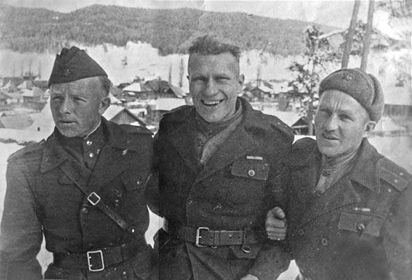 Известные советские альпинисты (слева направо) Евгений Абалаков, Георгий (Юрий) Одноблюдов, Николай Гусак во время работы в Военной школе альпинизма и горных лыж в Бакуриани. Фото 1943 года.